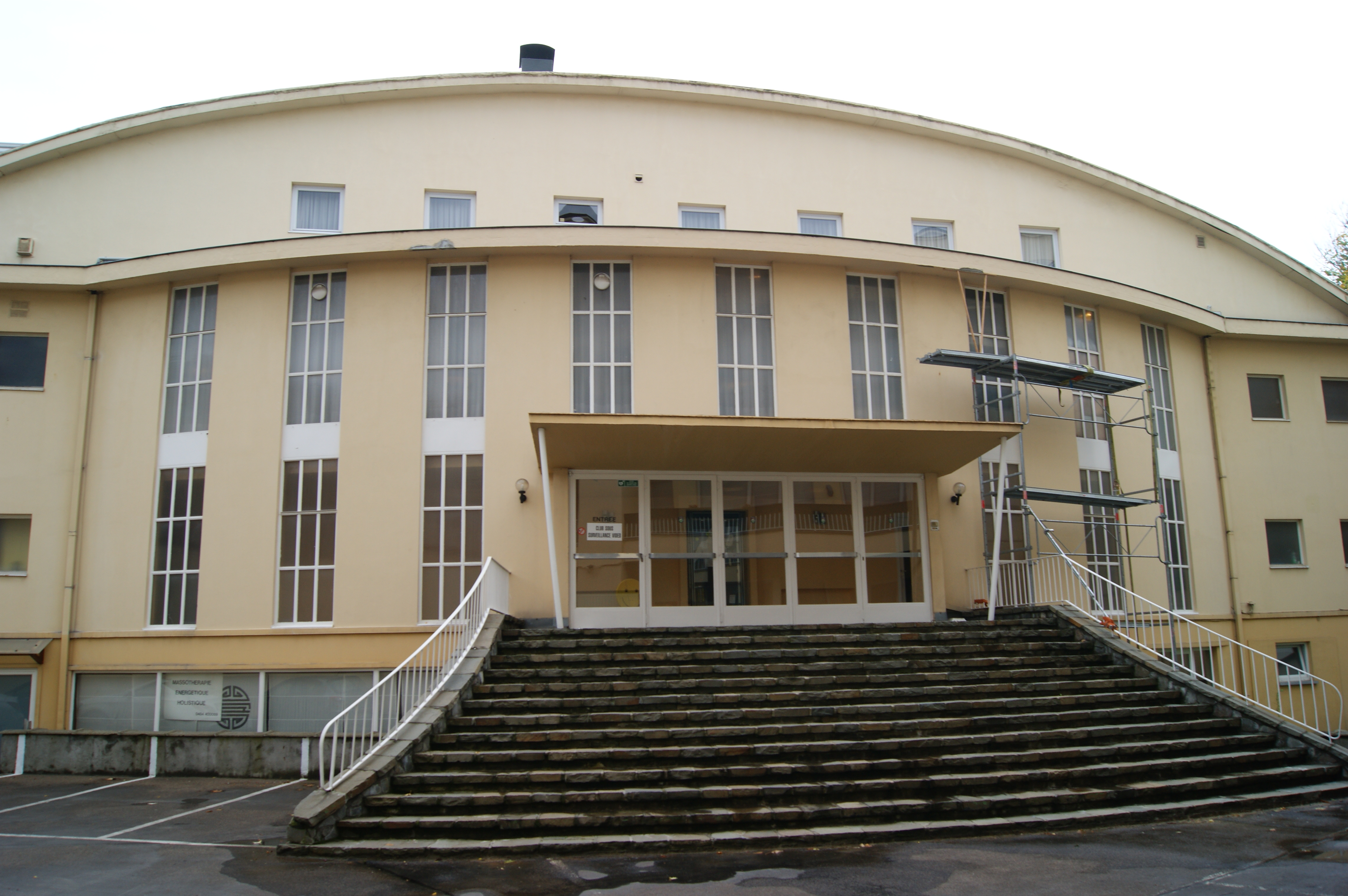 26 Rue du Beau Site, 1150 Bruxelles